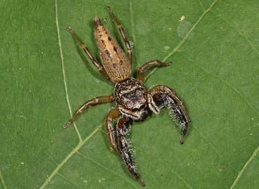 female Bavia sexpunctata from Okinawa.